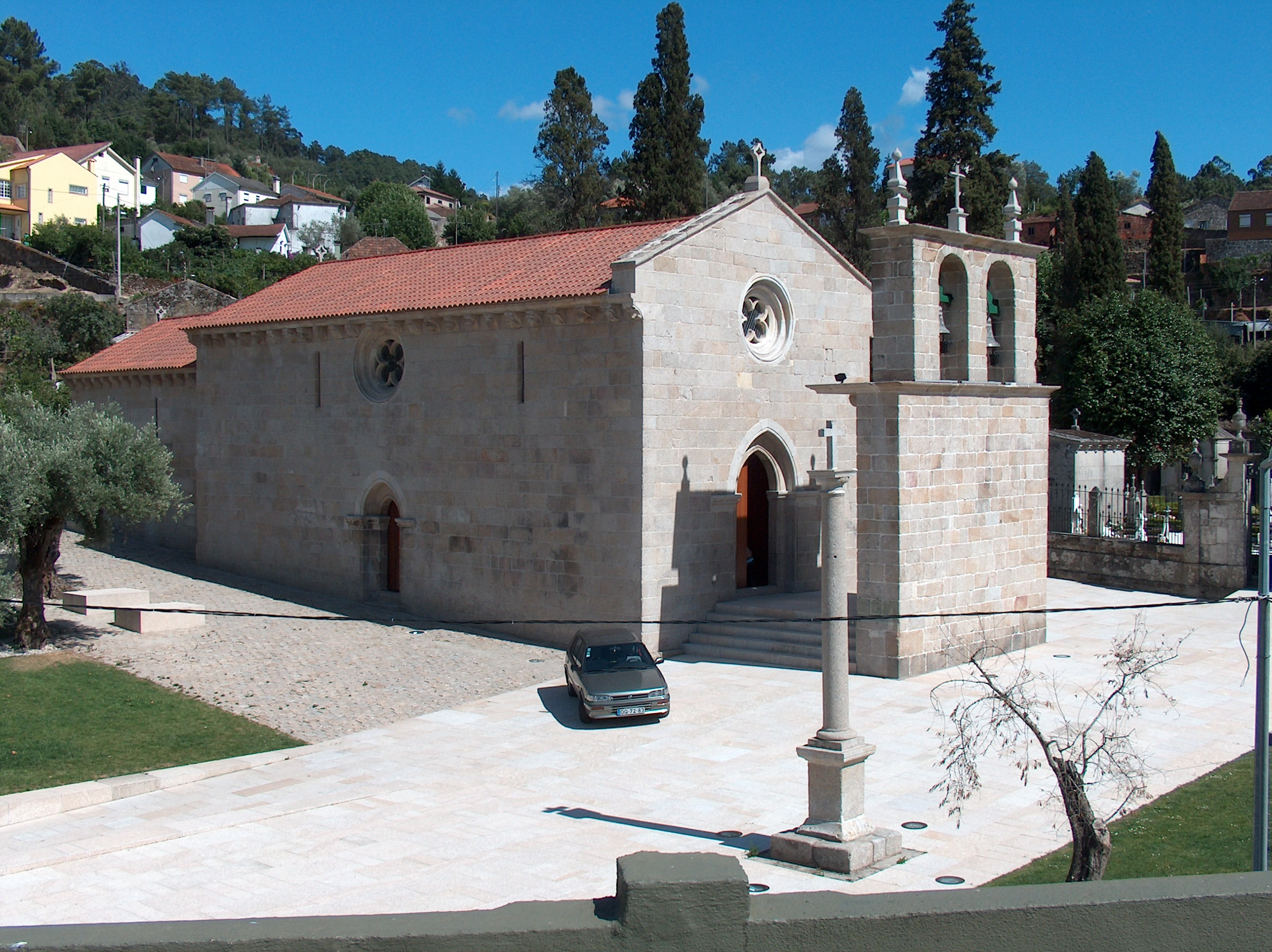 Igreja de Santa Maria ou Igreja de Nossa Senhora da Assunção ou Igreja Matriz de Vouzela